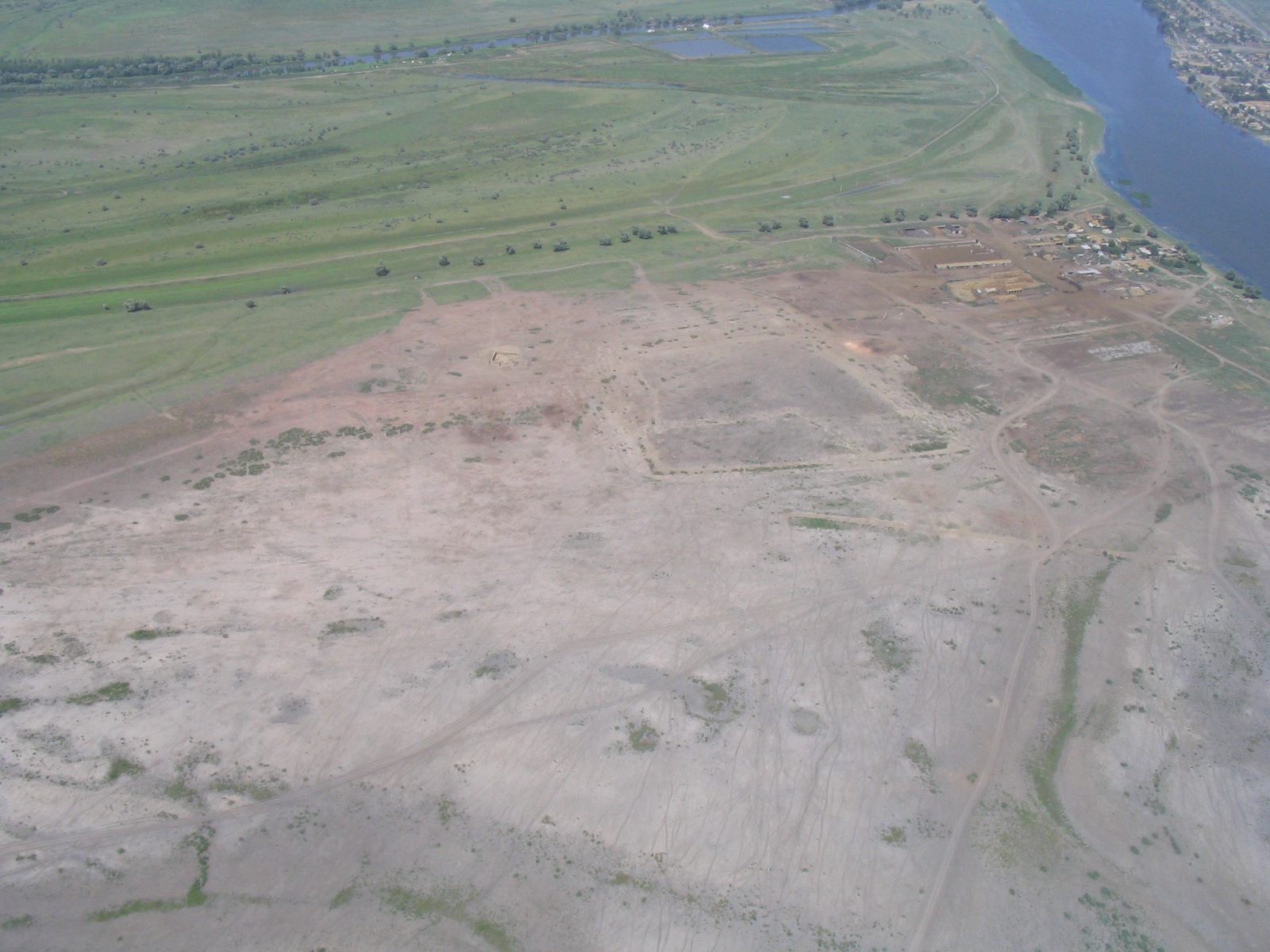 Вид на центральную часть Самосдельского городища с юг-юго-востока с высоты птичьего полёта.